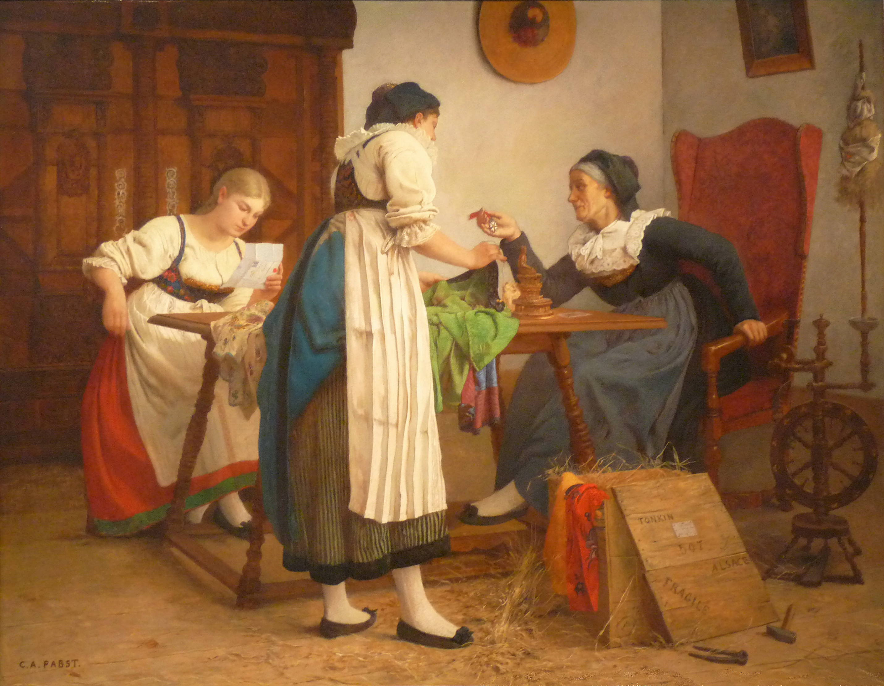 L'envoi du Tonkintitle QS:P1476,fr:"L'envoi du Tonkin" label QS:Lfr,"L'envoi du Tonkin"